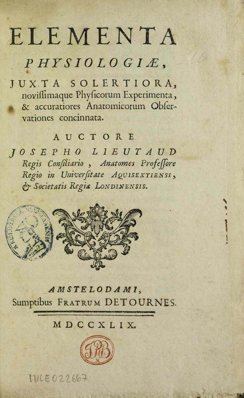 Frontespizio